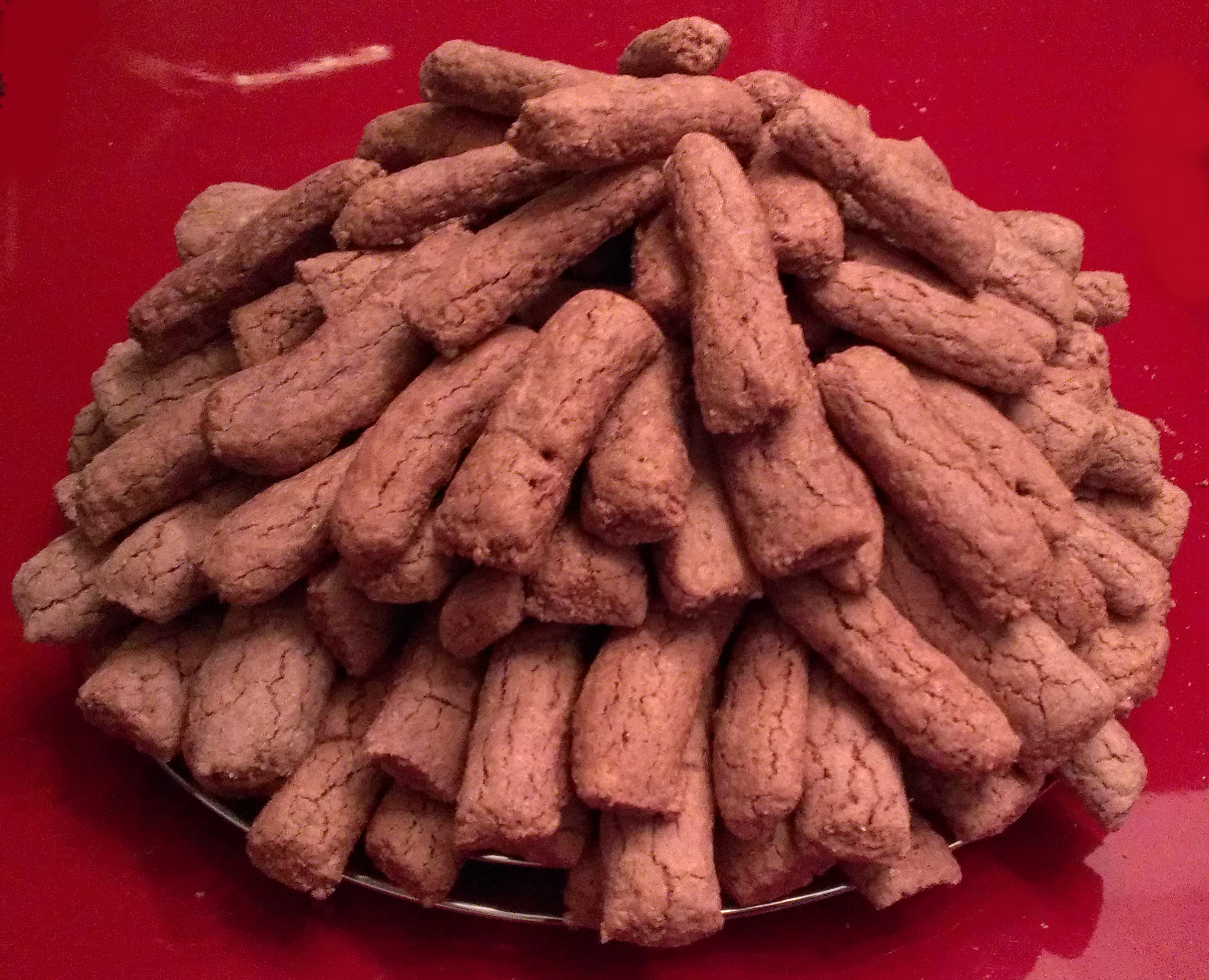 Der Zimtstängel ist ein schweizerisches Gebäck mit starkem Zimt Geschmack.